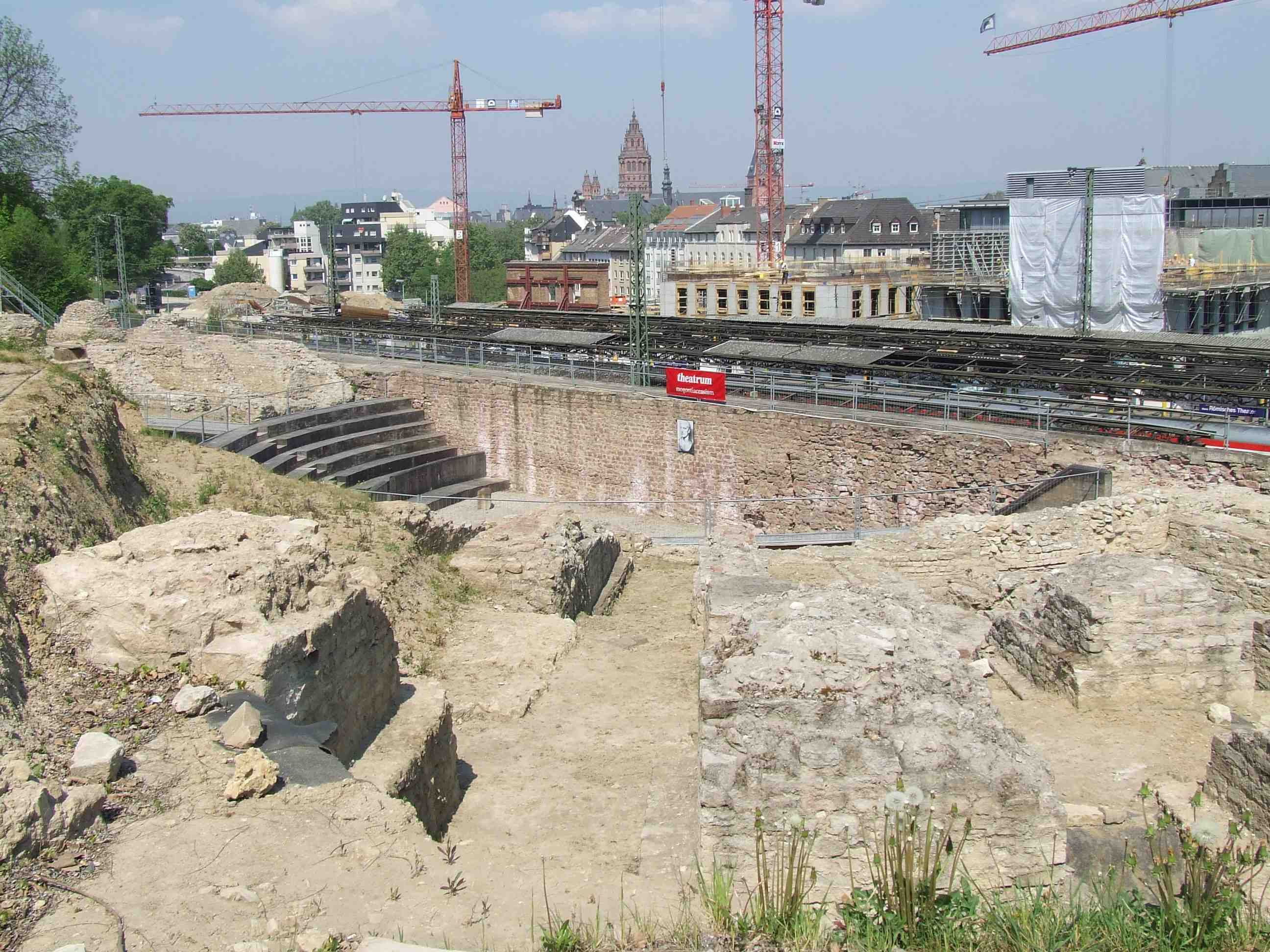 Römisches Theater Mainz. Im Hintergrund der Mainzer Dom.